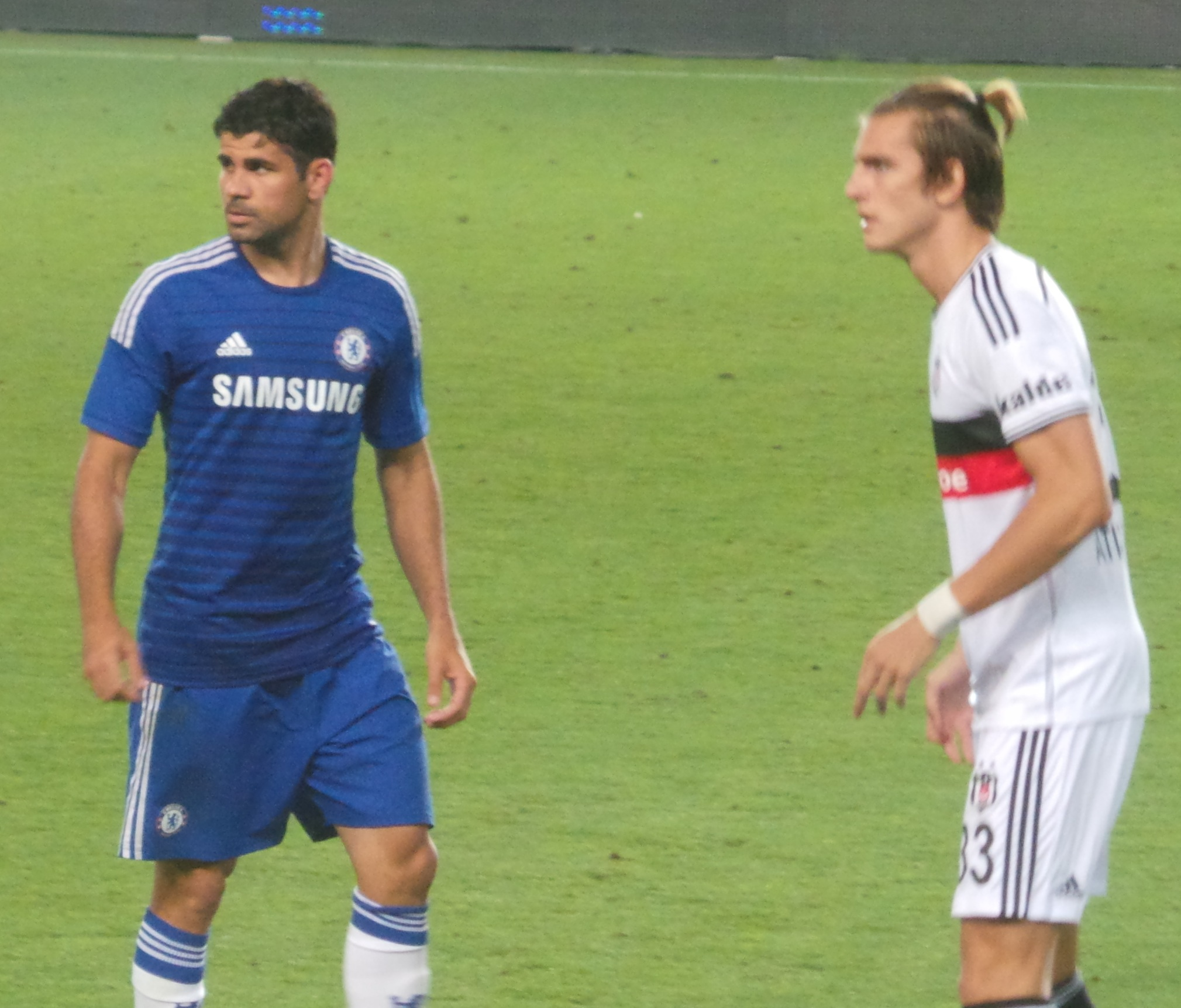 Diego Costa & Atınç Nukan